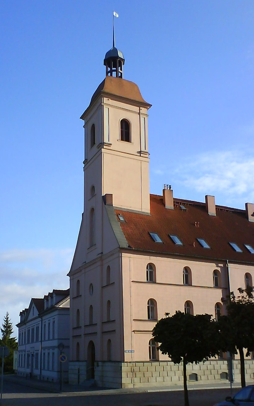 Garnisonskirche in Anklam